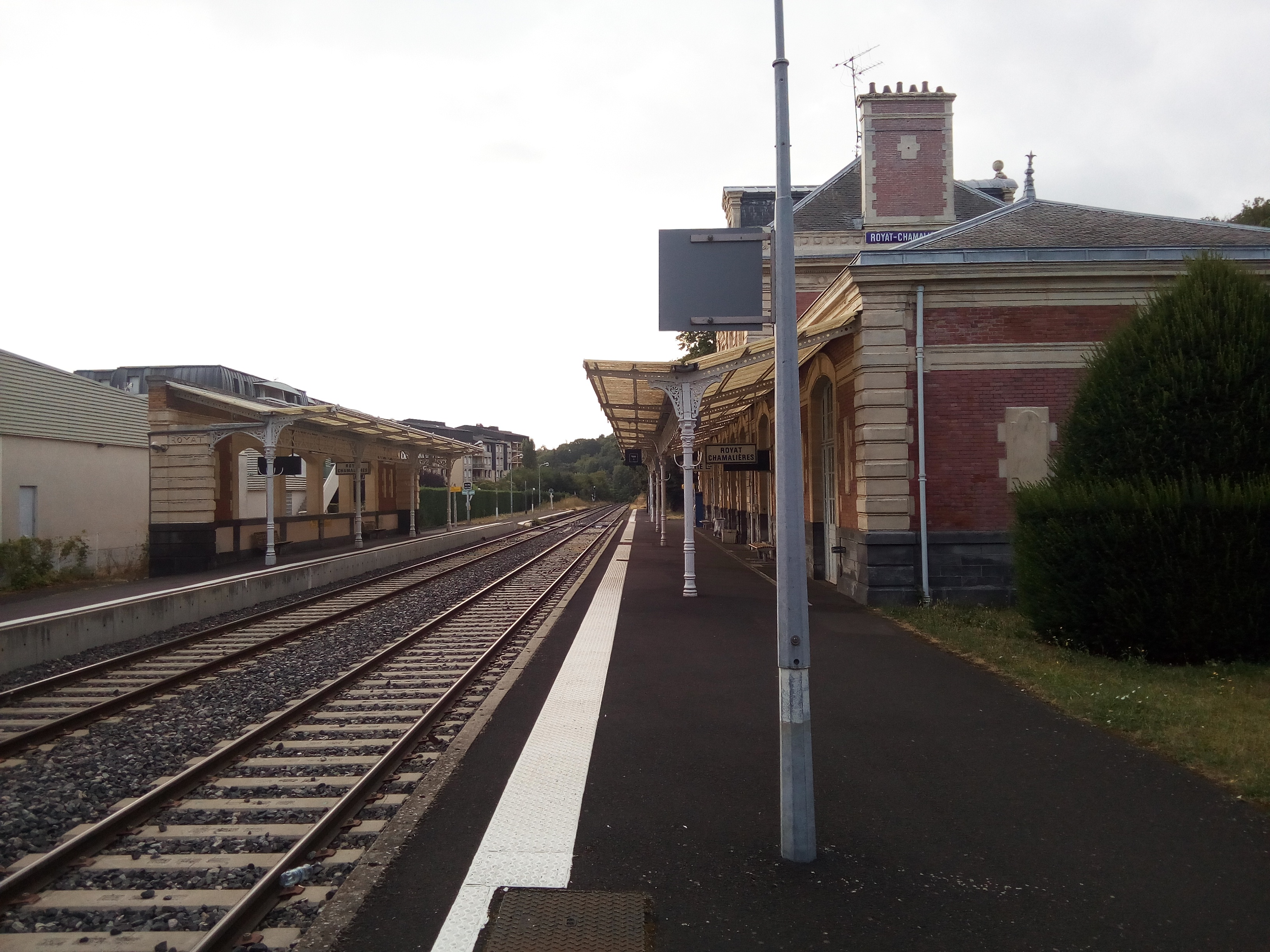 gare de Royat-Chamalières (Puy-de-Dôme, Auvergne)